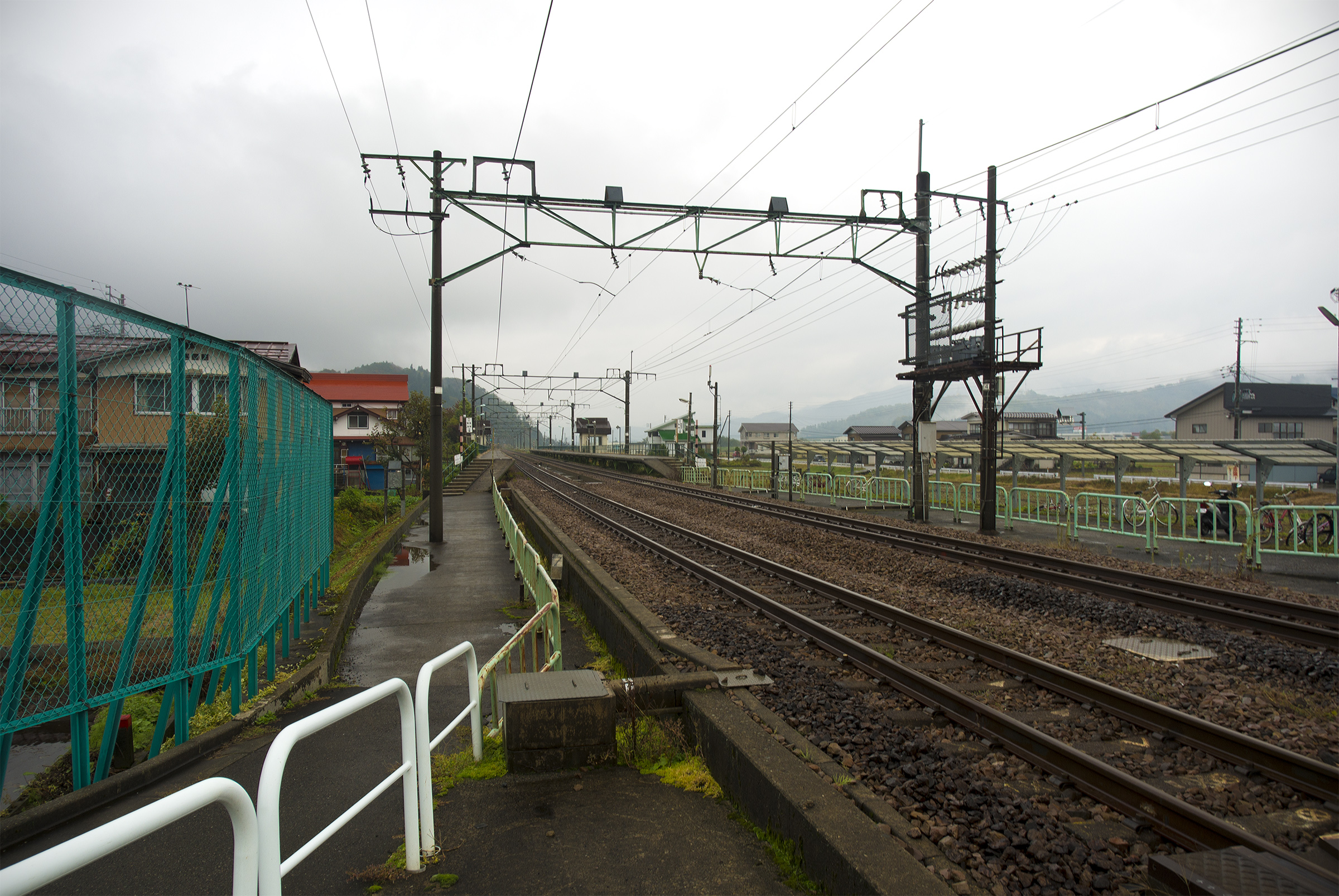 東日本旅客鉄道株式会社上越線八色駅